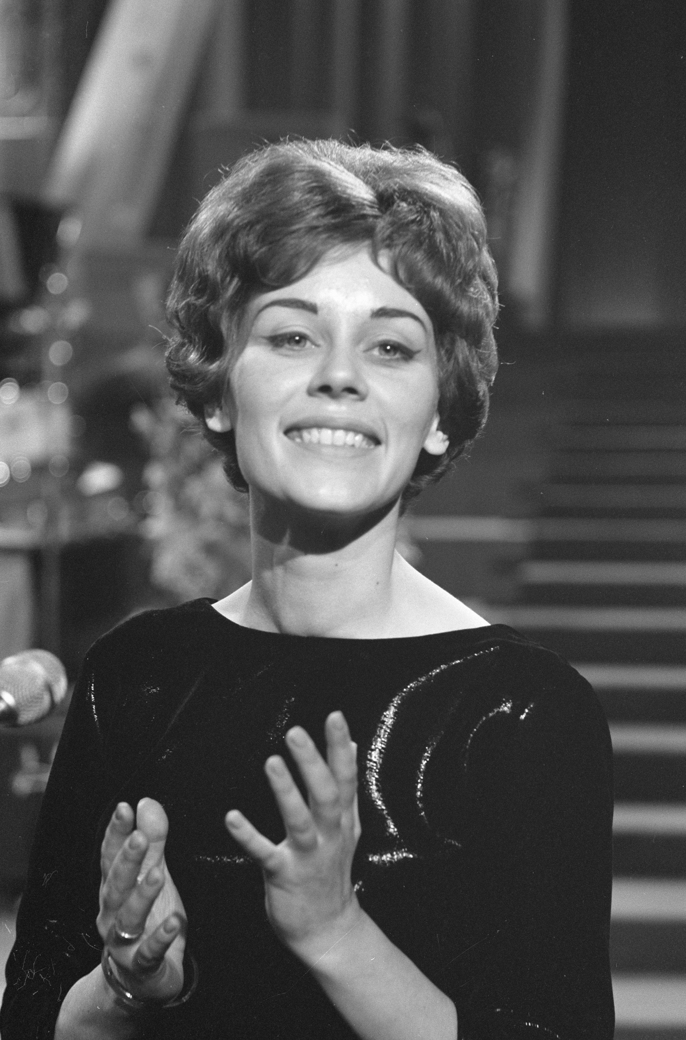 Collectie / Archief : Fotocollectie Anefo Reportage / Serie : [ onbekend ] Beschrijving : Nationale Finale Song Festival in Concordia te Bussum. Conny van den Bosch Datum : 27 februari 1962 Locatie : Bussum Persoonsnaam : Concordia, Conny van den Bosch Fotograaf : Pot, Harry / Anefo Auteursrechthebbende : Nationaal Archief Materiaalsoort : Negatief (zwart/wit) Nummer archiefinventaris : bekijk toegang 2.24.01.05 Bestanddeelnummer : 913-5756